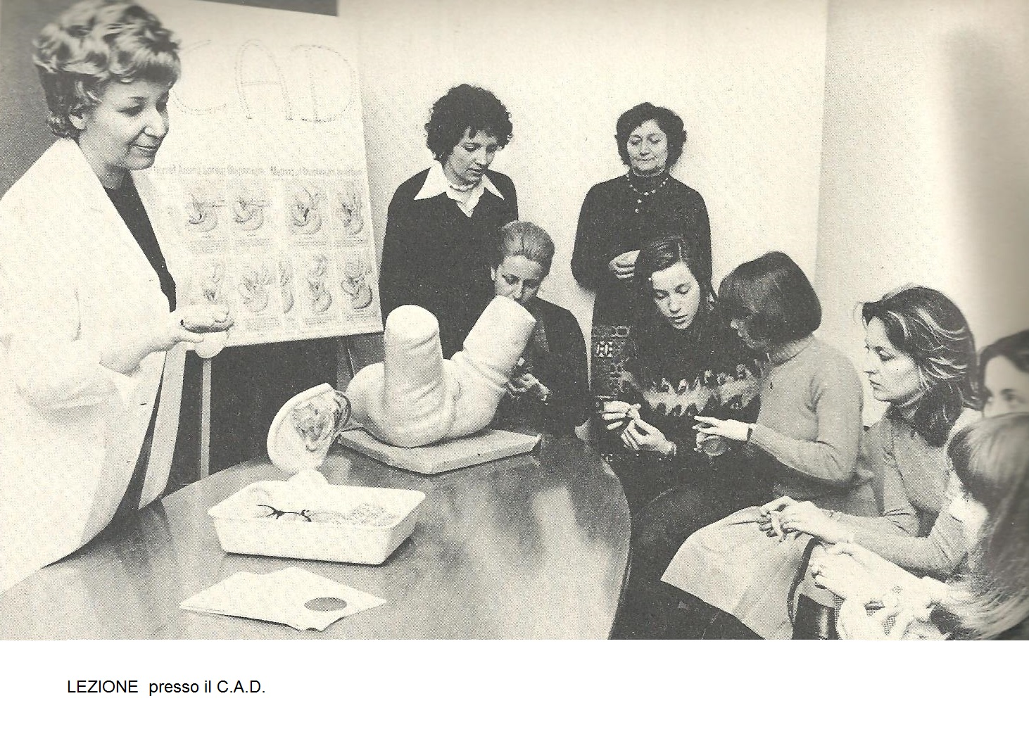 Lezione presso il C.A.D.